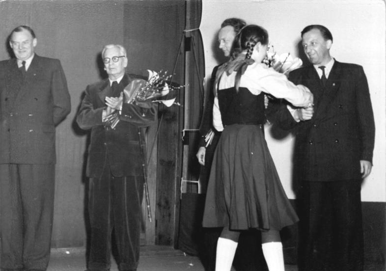 Seelow, "Filmfesttage auf dem Lande Frühjahr 1954" Zentralbild Funck 16.3.1954 "Filmfesttage auf dem Lande Frühjahr 1954" haben begonnen Im Oderbruchkreis Seelow (Bez. Frankfurt-Oder) begannen mit der Festaufführung des DEFA-Farbfilms "Ernst Thälmann - ein Sohn seiner Klasse" im MTS Kulturhaus Sachsendorf die "Filmfesttage auf dem Lande- Frühjahr 1954". Den Genossenschafts- und werktätigen Einzelbauern, den Landarbeitern und Arbeitern der Betriebe stellten sich in dieser Vorstellung eine Gruppe der Darsteller des Dokumentar-Films vor. UBz: Junge Pioniere, Kinder der werktätigen Bauern, danken mit Blumengrüßen den Darstellern. (Mit Blumenstrauß Rudolf Klix, Darsteller des Willbrandt).